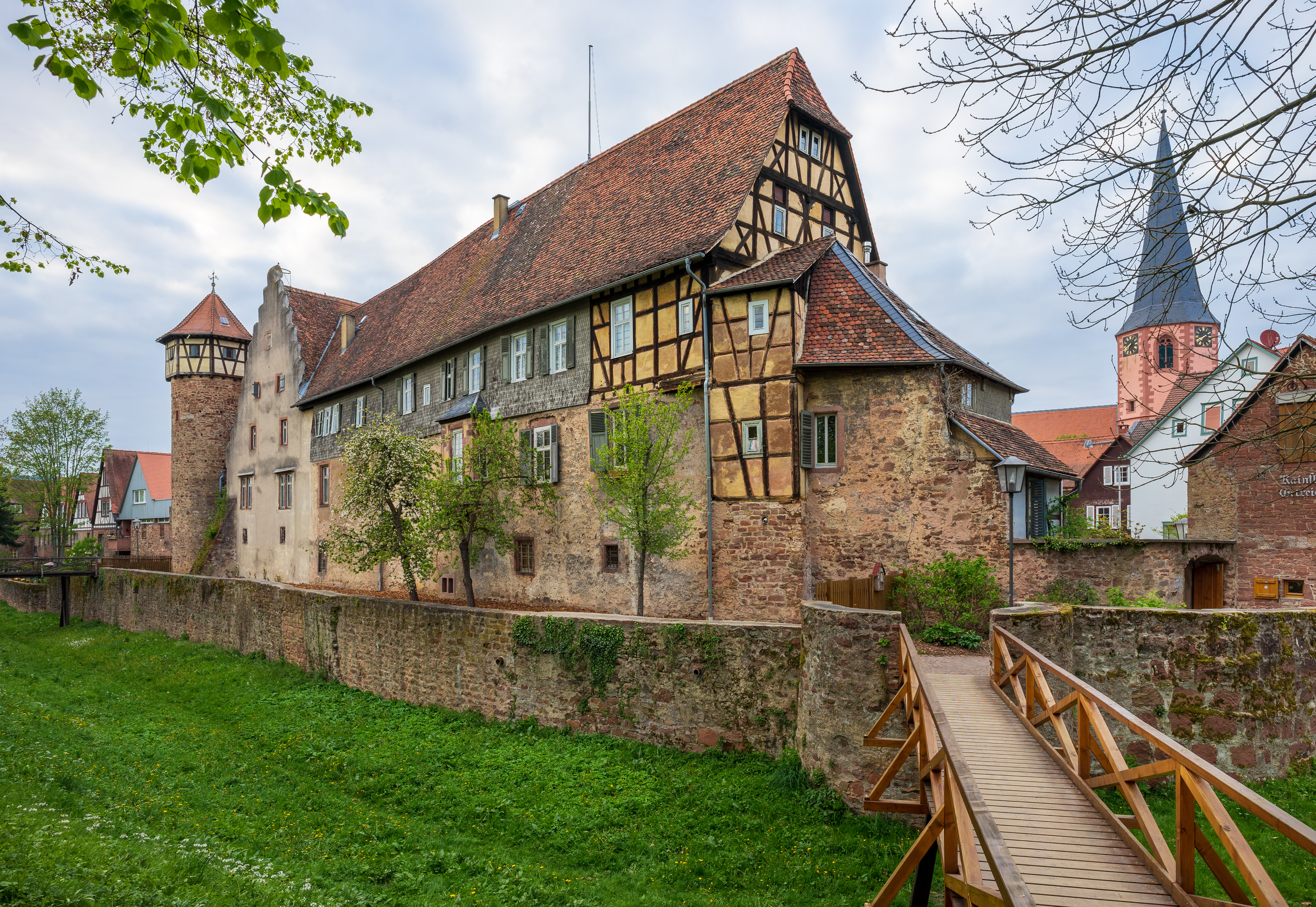 Michelstadt: Die Gebäude der ehemaligen Burg Michelstadt (auch als Kellerei bekannt), von Südosten über den Burggraben gesehen. Rechts ist der Turm der Stadtkirche sichtbar.